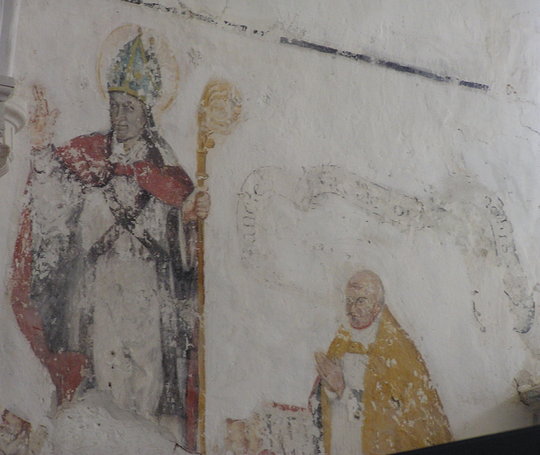 Fresque murale de l'Eglise Saint-ZAndré de la Chapelle-Huon (Sarthe)